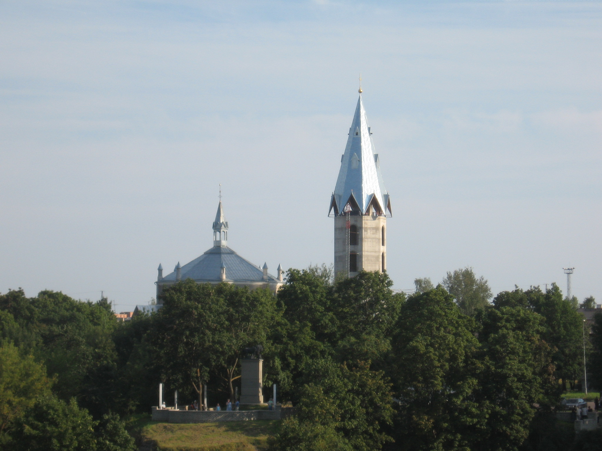 Narva Aleksandri kirik